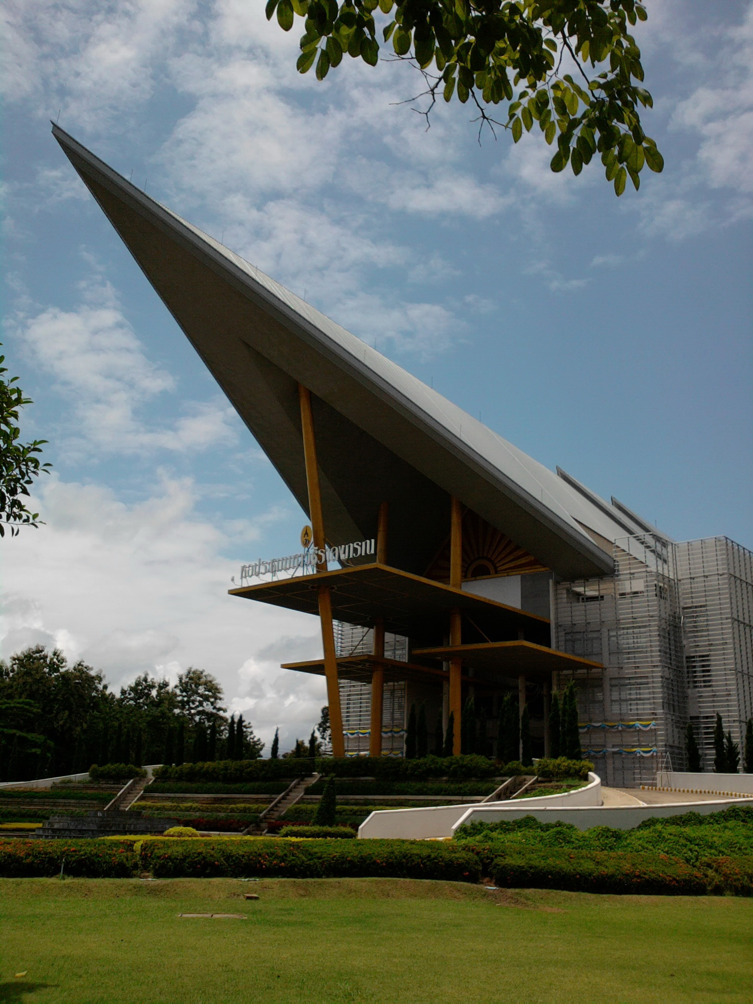 มหาวิทยาลัยราชภัฏสกลนคร